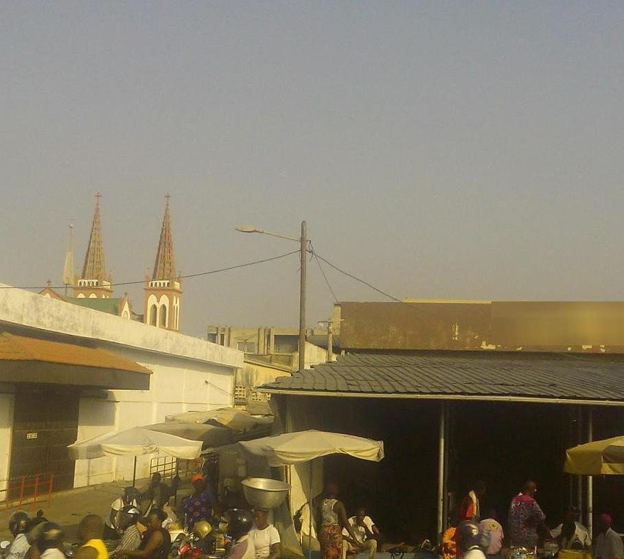 Lome, Togo